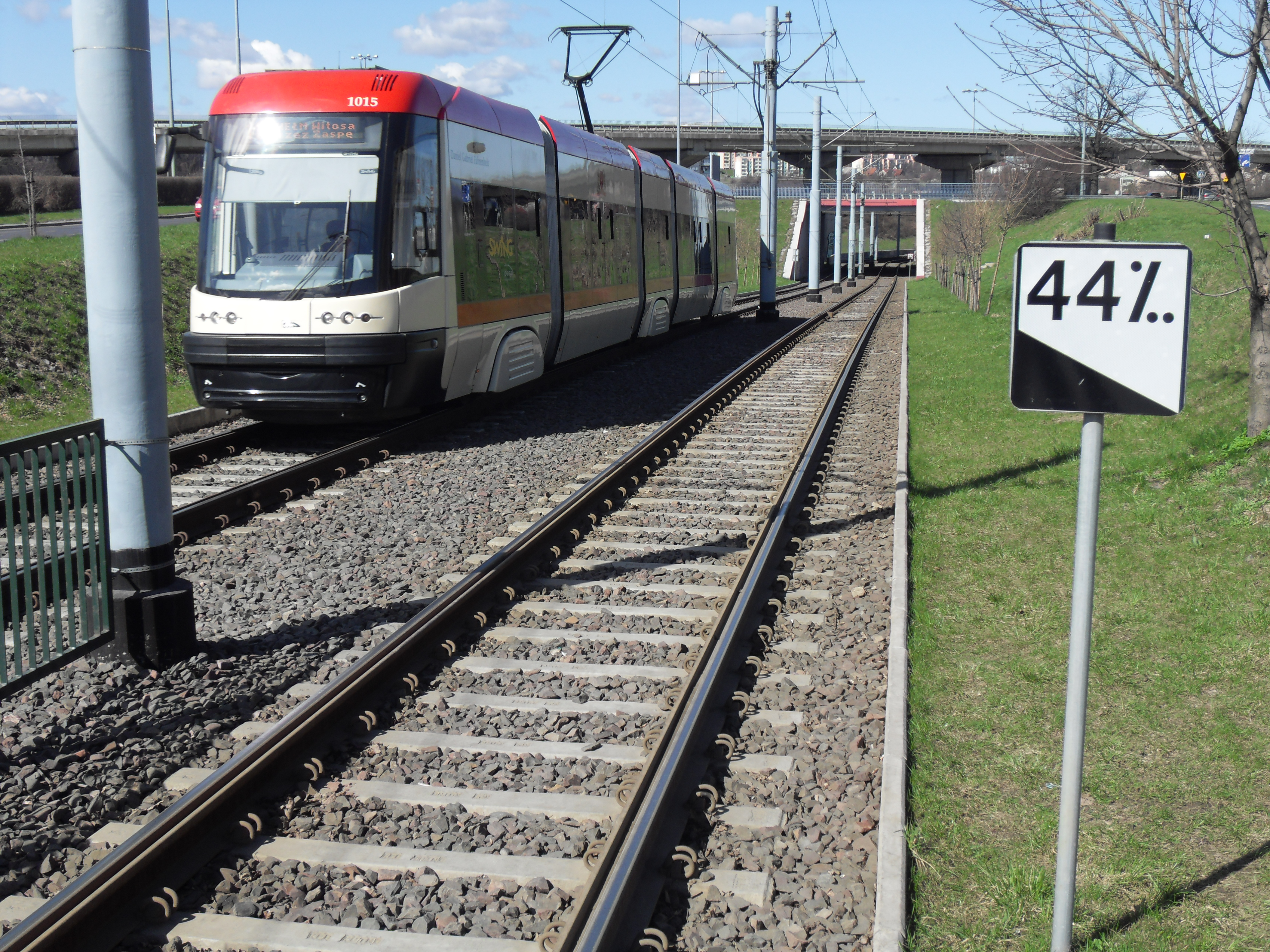 Tramwaj PESA 120Na (#1015) wjeżdża na gdańskie osiedle Chełm, al. Sikorskiego.